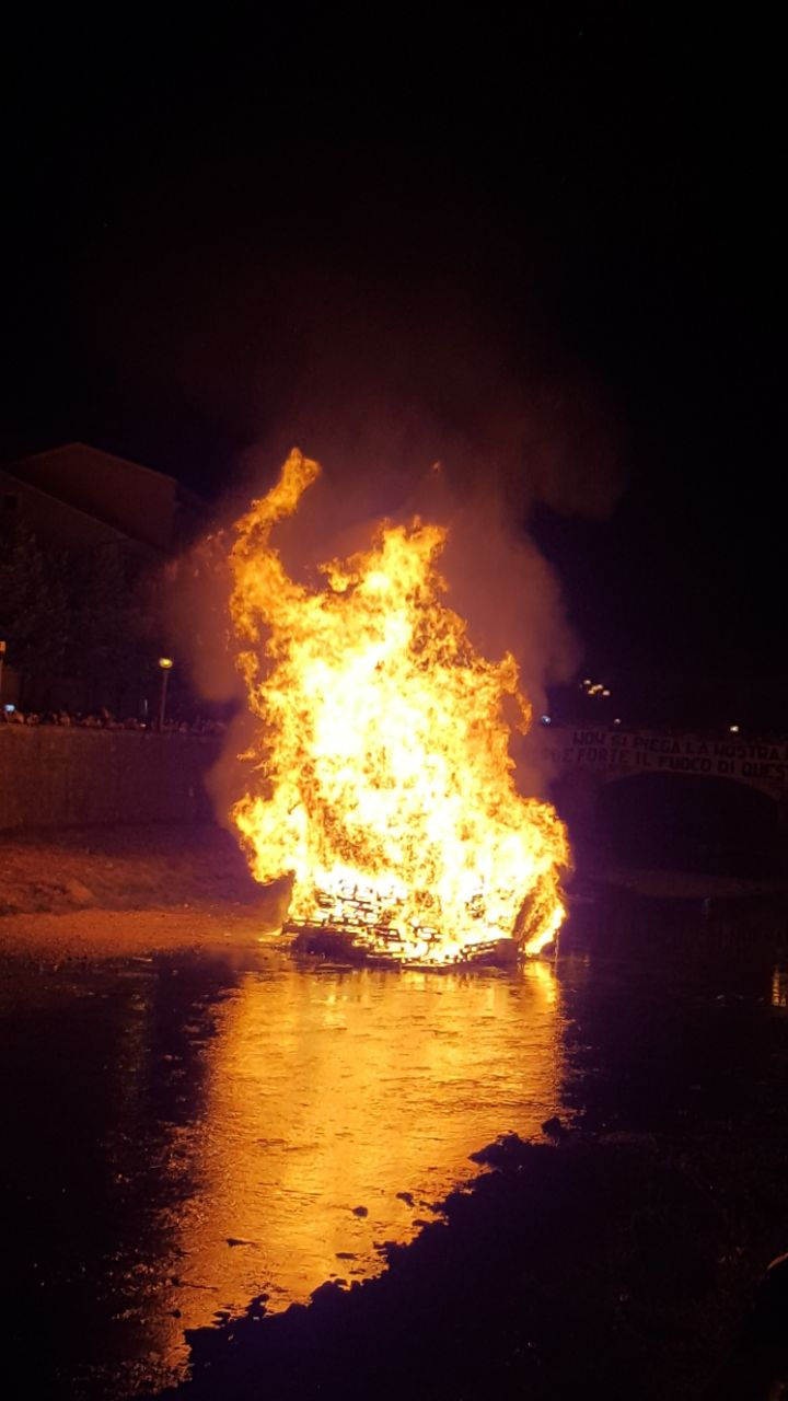 Falò di san Giovanni 2017